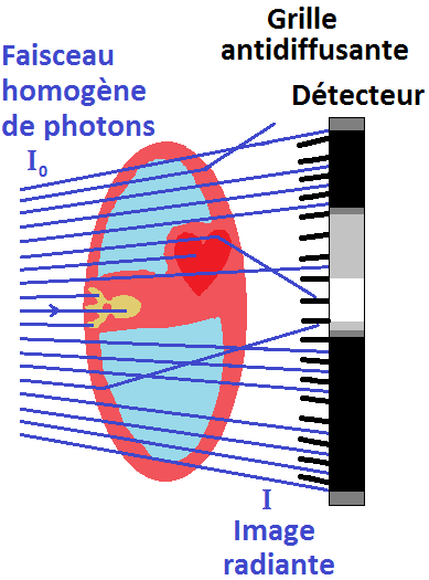 Schéma représentant le principe de base de la fibroscopie : l'atténuation différentielle des photons. Limitation du diffusé arrivant au détecteur grâce à une grille anti-diffusante. Faisceau divergent.